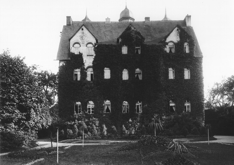 Alte Fotografie des Schlosses Holte